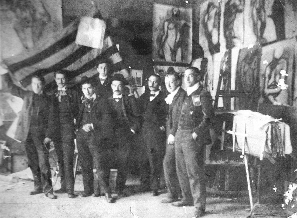 Manuel Ainaud Sanchez i els Negres al seu estudi, aixecant una estelada, mentre celebren el triomf de Solidaritat Catalana